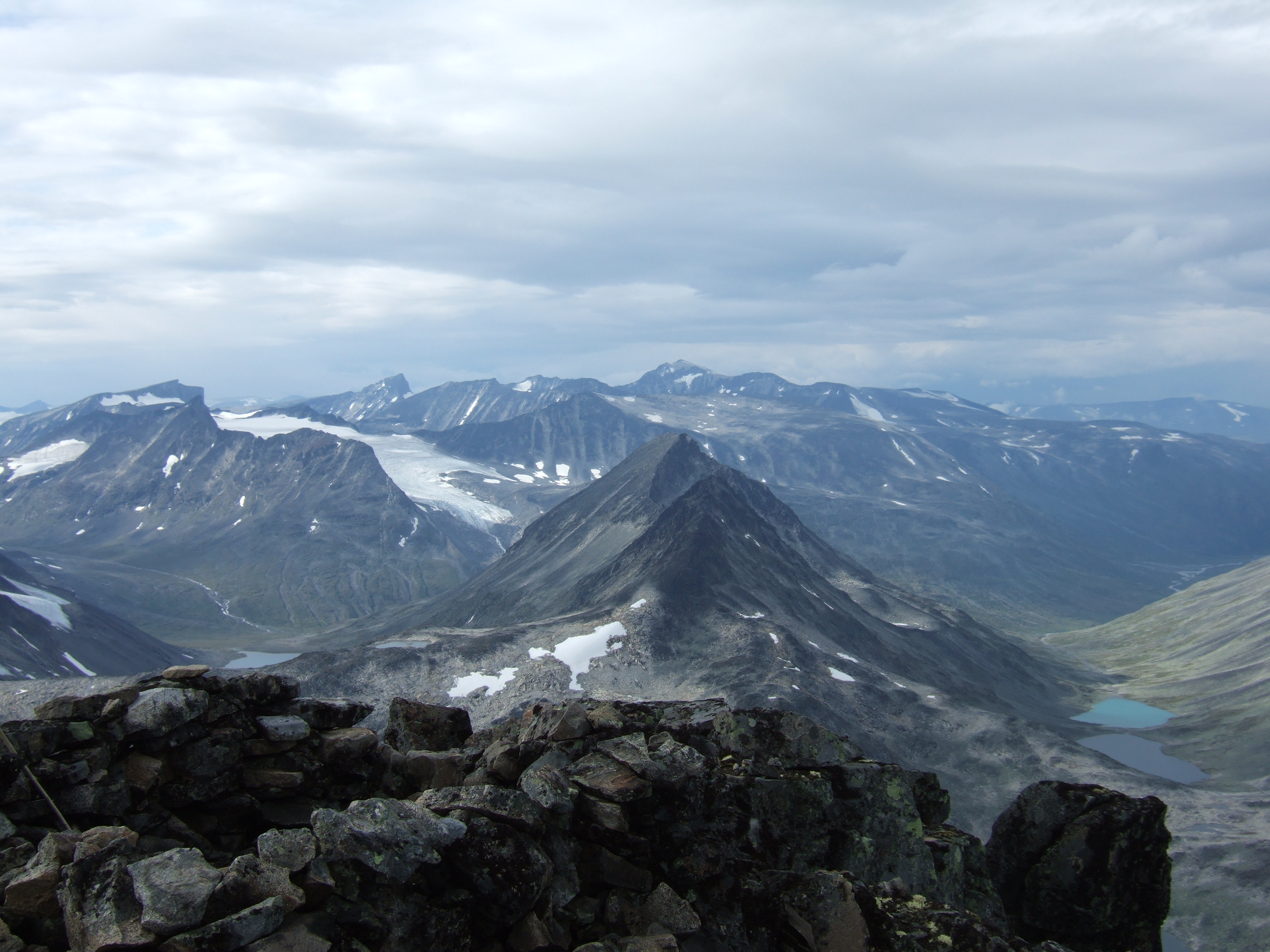 Urdalstindane og Buggeholstindan sett fra Semeltind, Jotunheimen.